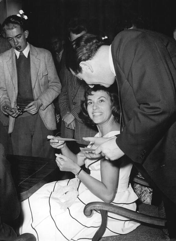 Halle/Saale, Premiere "Simplon-Tunnel", Brigitte Krause Zentralbild Schmiljun Fröhl-L 14.6.59 Halle. Arbeiterfestspiele - DEFA-film "Simplon-Tunnel" uraufgeführt. Der DEFA-Film "Simplon-Tunnel", ein Hohelied auf die internationale Solidarität der Arbeiter wurde am 13.6.59, in Anwesenheit der Hauptdarsteller und des Regisseurs in den Halleschen Goethe-Lichtspielen vor einem begeisterten Publikum uraufgeführt. UBz: Hauptdarstellerin Brigitte Krause gibt Autogramme.